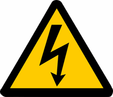 Pictograma: Perill elèctric